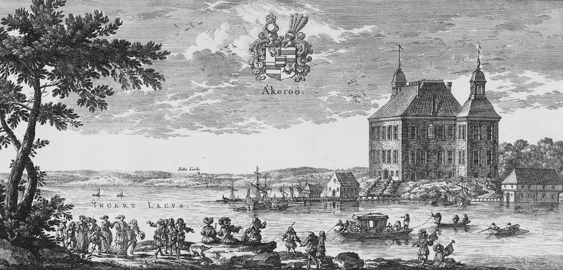 Åkerö slott i Suecia antiqua et hodierna